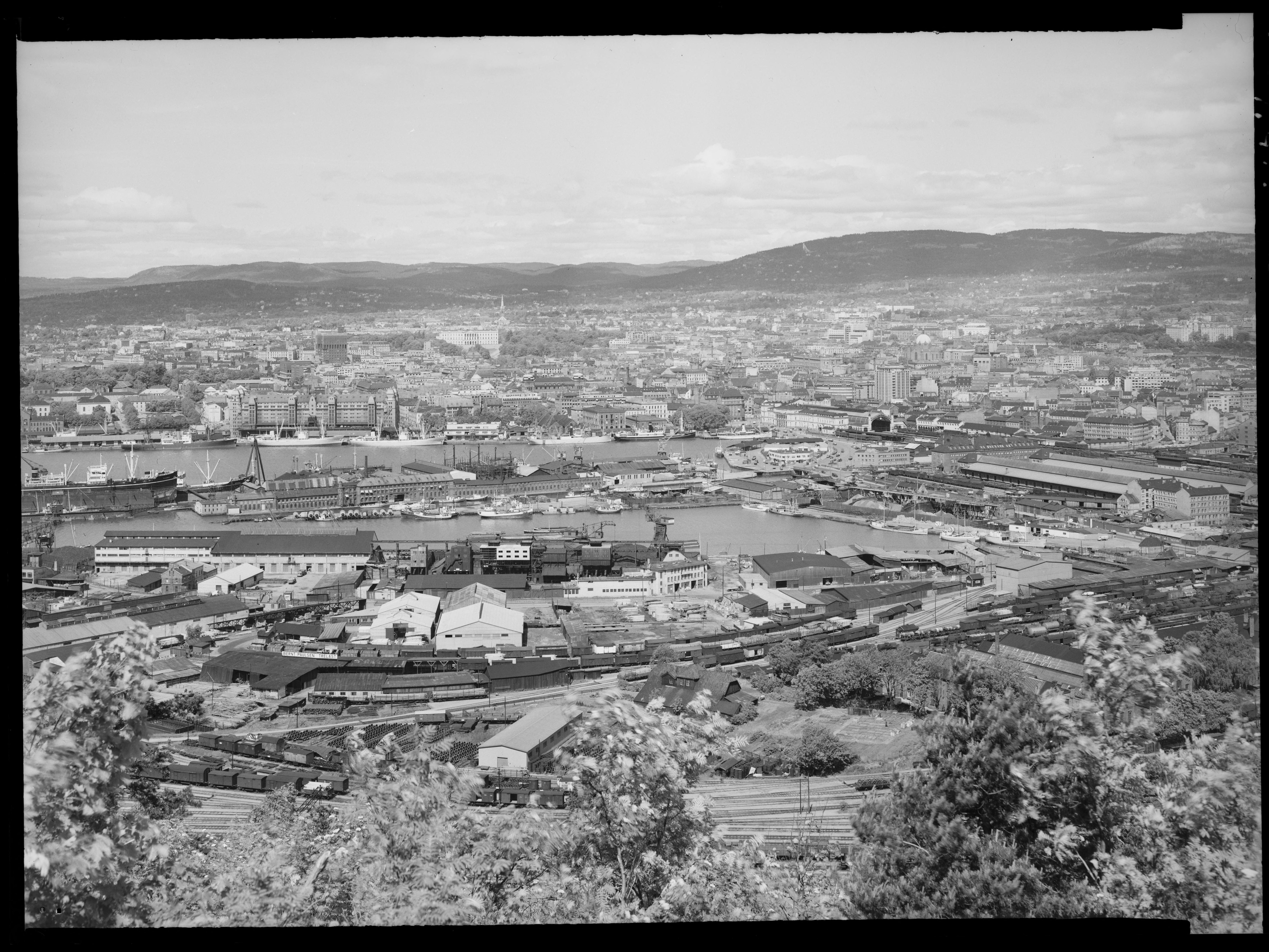 Bildet er hentet fra Nasjonalbibliotekets bildesamling. Anmerkninger til bildet var: Fotograf ukjent Bjørvika,Oslo, Oslo, Oslo